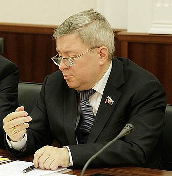 Александр Торшин (справа) и Евгений Туголуков